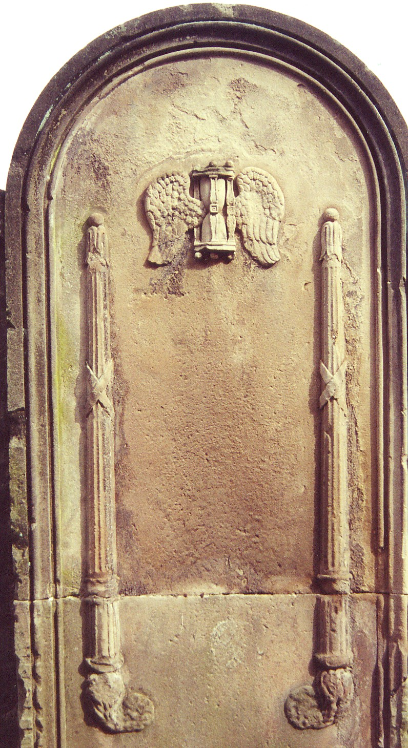 meneau (droite ou gauche identiques) de l'entrée du cimetière rive gauche